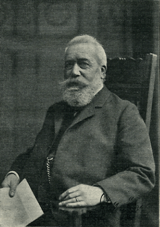 Ferdinand Krüger (1843-1915)Depicted person: Ferdinand Krüger – writer (1843-1915)